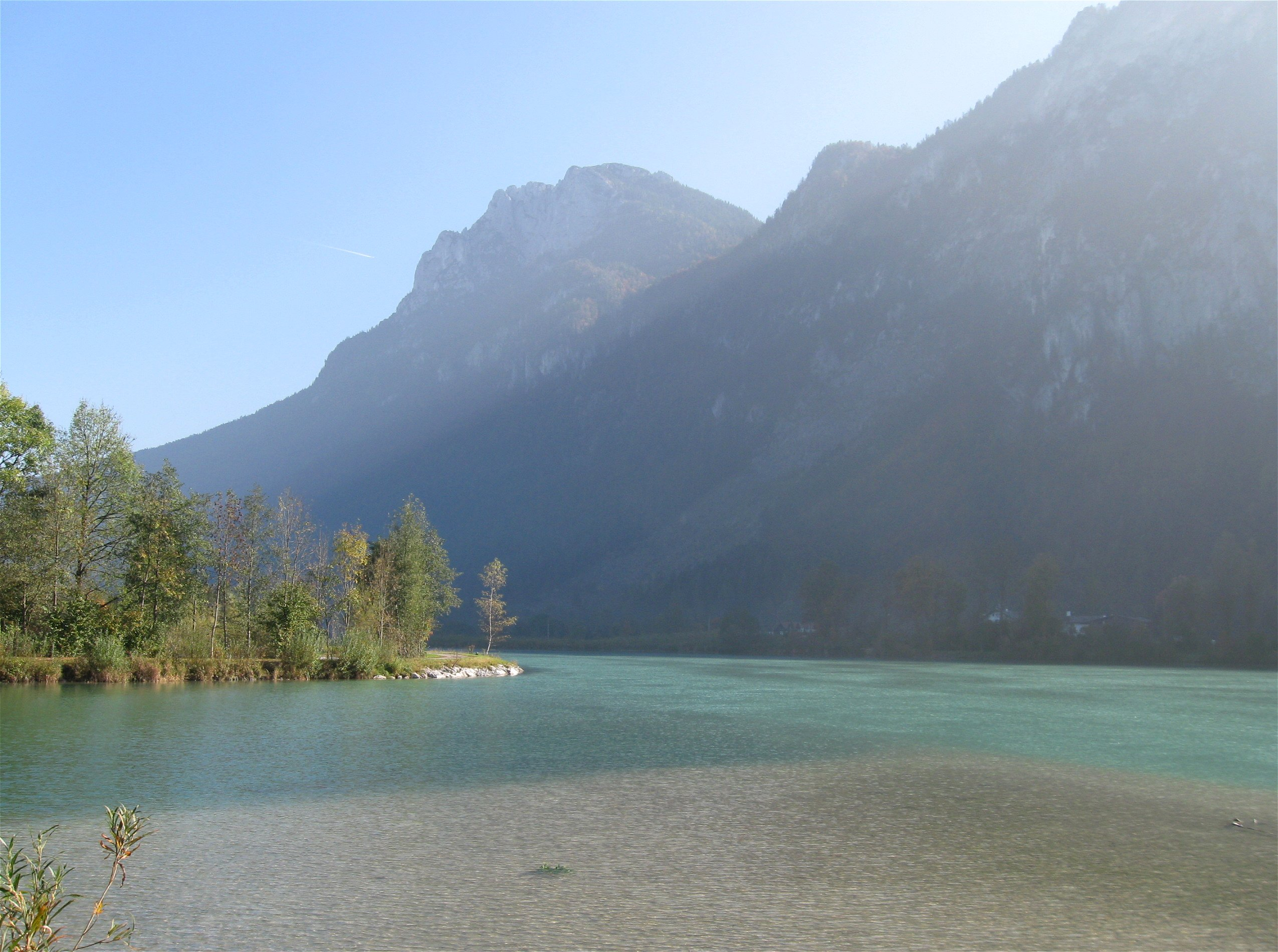 Mündung des Kieferbachs in den Inn bei Kiefersfelden, Zahmer Kaiser im Hintergrund